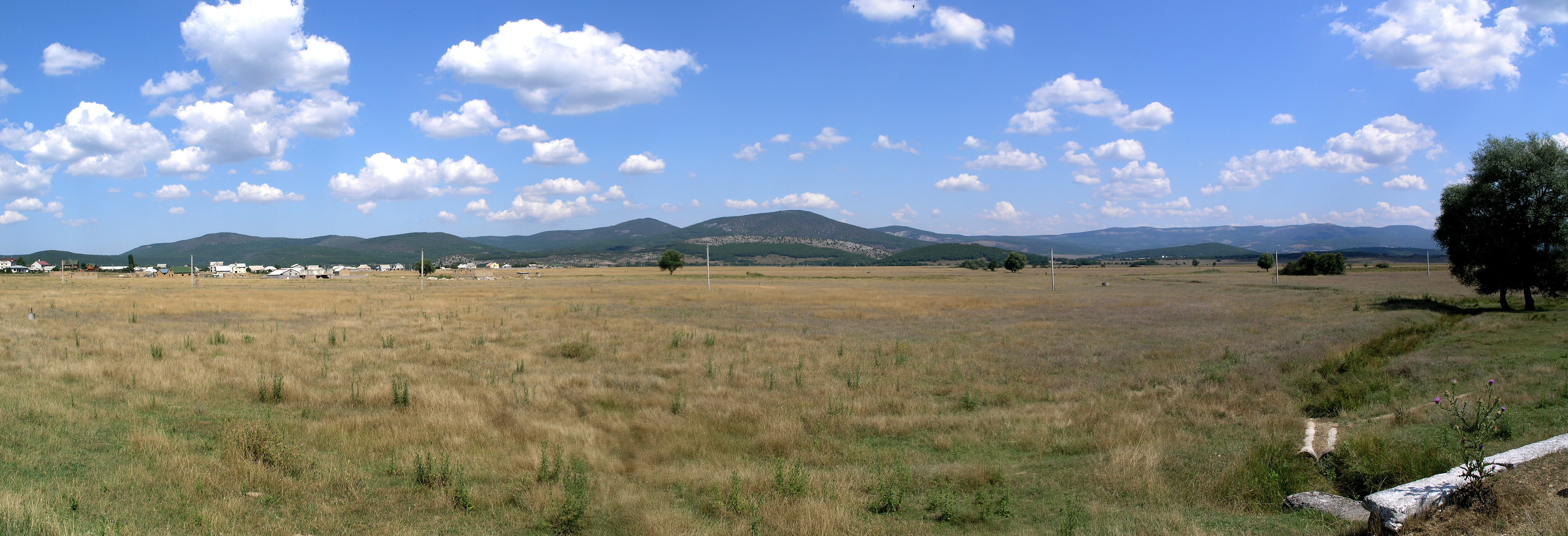 Украина, Крым. Панорама Байдарской долины